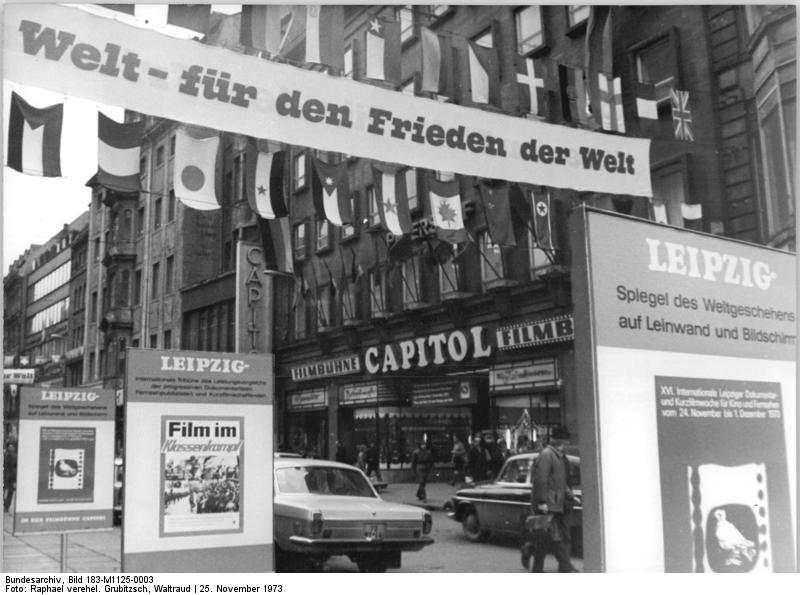 Leipzig, Petersstraße, Kino "Capitol", Zuschauerraum ADN-ZB Raphael 25.11 1973 Gu Leipzig: Die XVI. Internationale Dokumentar und Kurzfilmwoche für Kino und Fernsehen wurde am 24.11.1973 im Festivalkino "Capitol" in der Leipziger Petersstraße eröffnet.